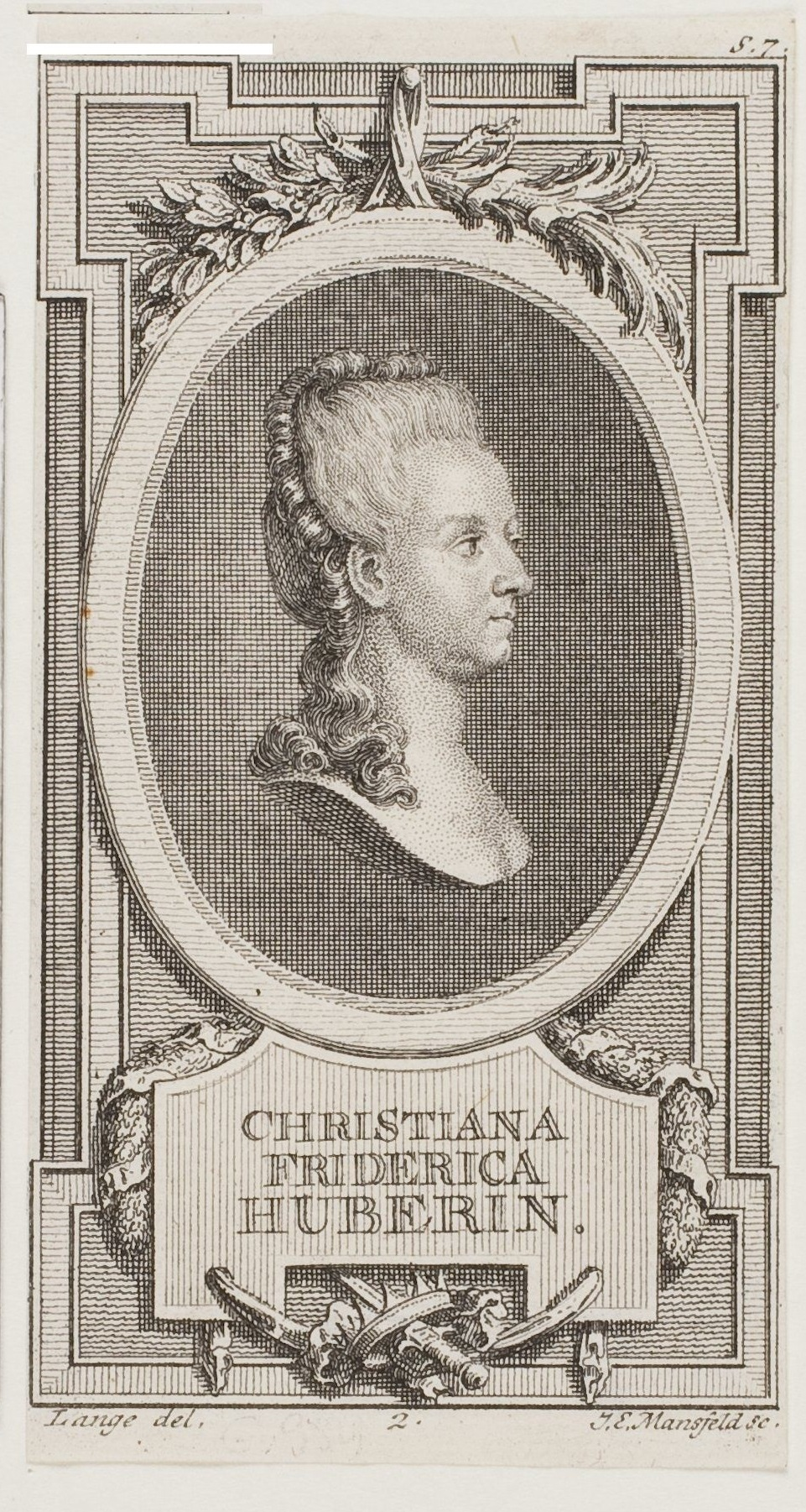 Christiana Friderica Huberin, in: Johann Heinrich Müller: Genaue Nachrichten von beyden kaiserlich-königlichen Schaubühnen und andern öffentlichen Ergötzlichkeiten in Wien 1772 Joseph Lange (Maler) und Johann Ernst Mansfeld (Stecher)